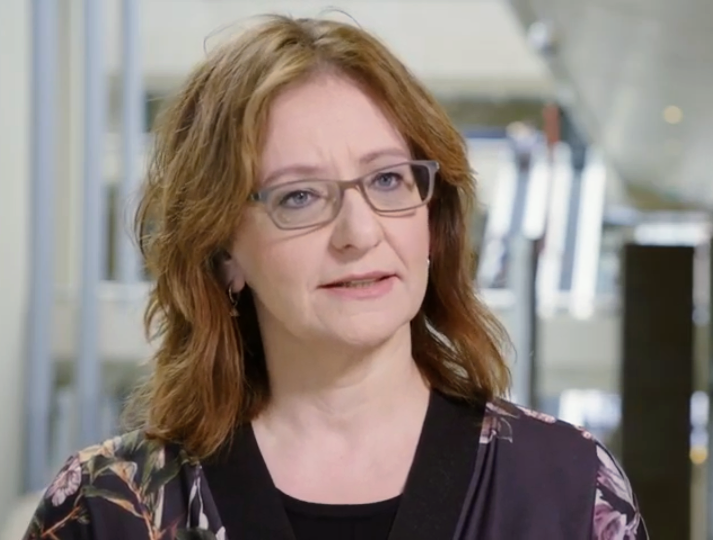 Wat doet de commissie voor Defensie? De commissie houdt zich bezig met onderwerpen die onder de verantwoordelijkheid vallen van het ministerie van Defensie. Ze spreken onder andere over zaken als materieel, personeel, nazorg en veteranen. De beelden zijn afkomstig van het ministerie van Defensie.